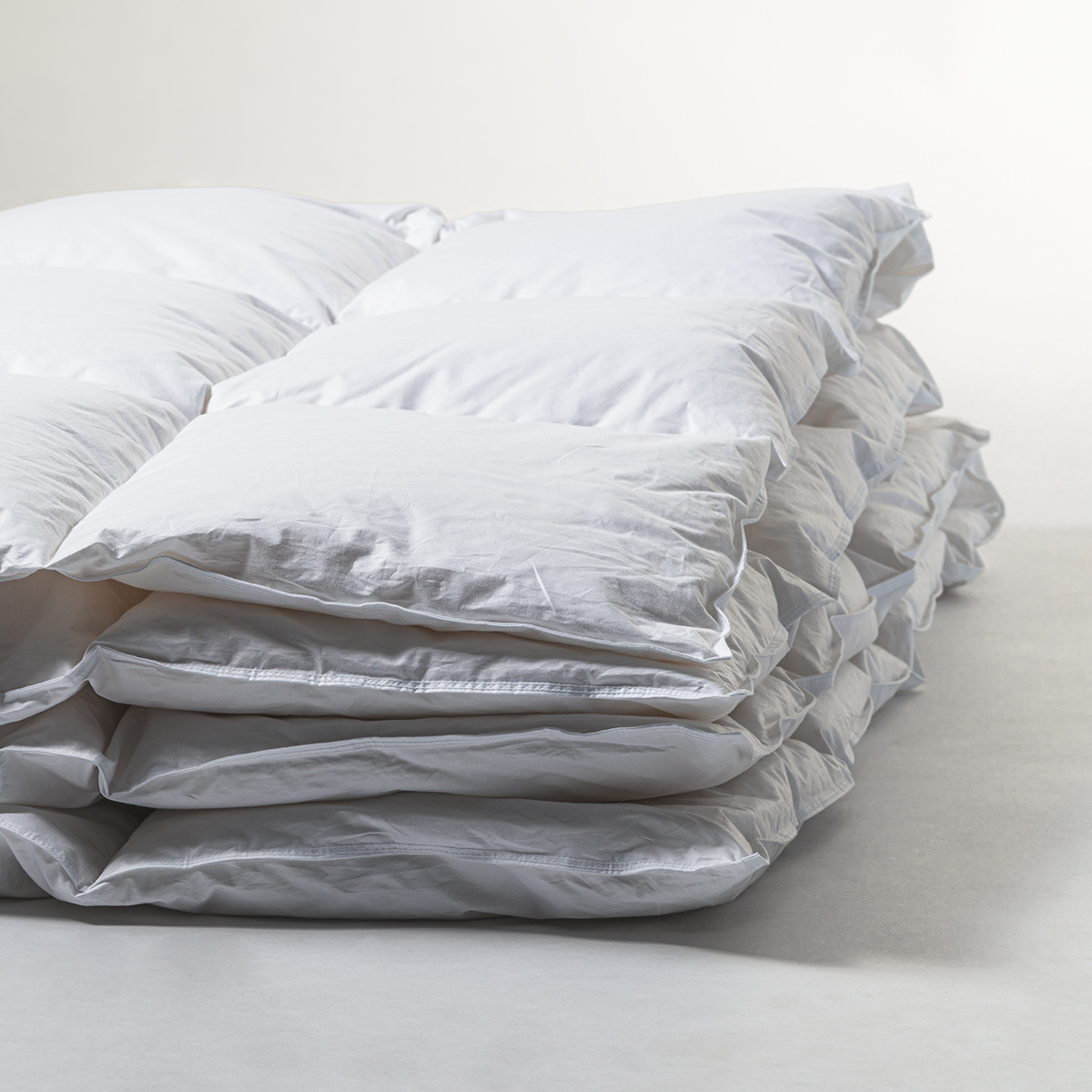 Gestepptes Karo-Duvet in mittlerer Wärmestufe, zweifach zusammengelegt.